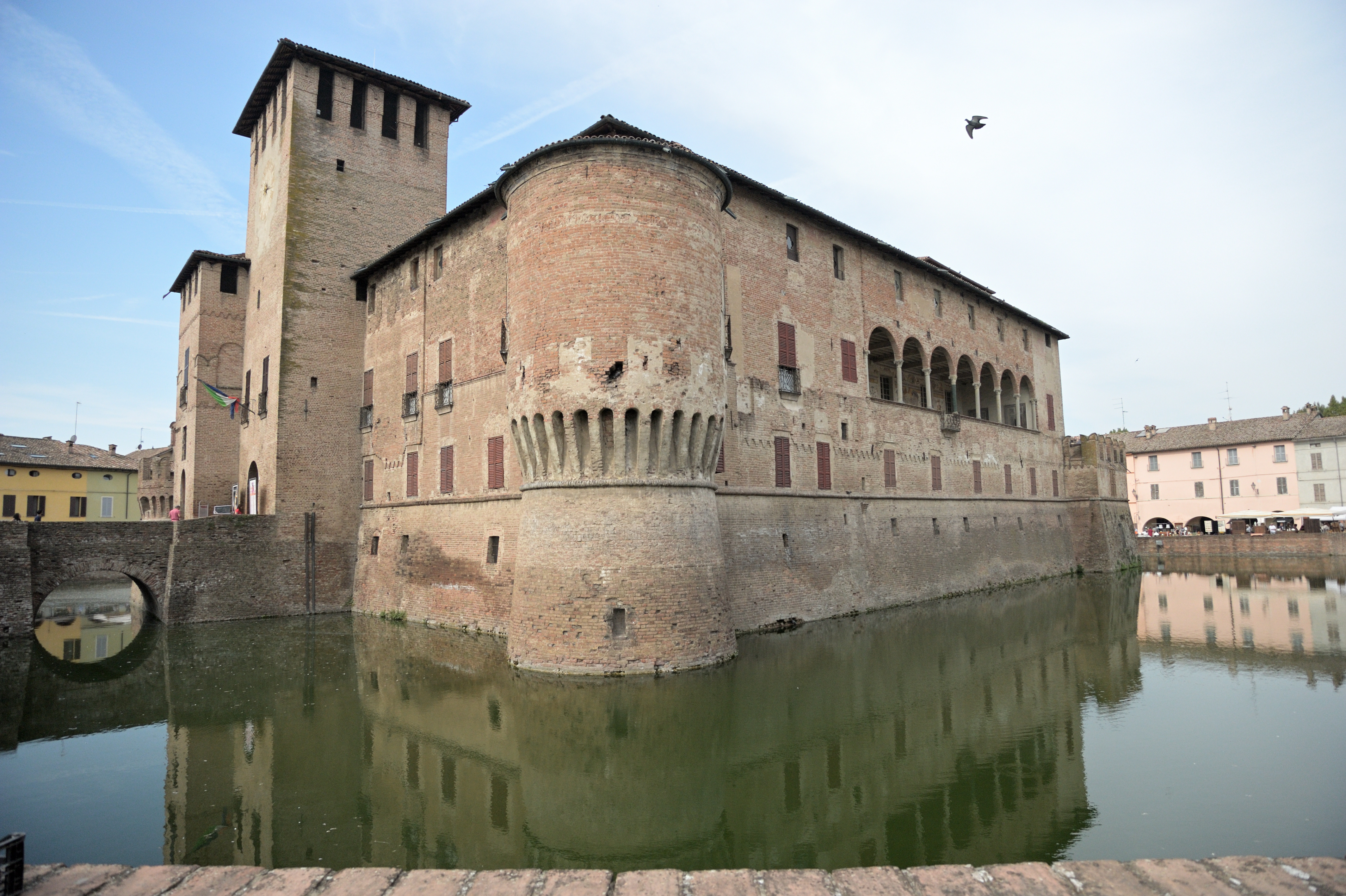 rocca Sanvitale Fontanellato This is a photo of a monument which is part of cultural heritage of Italy.